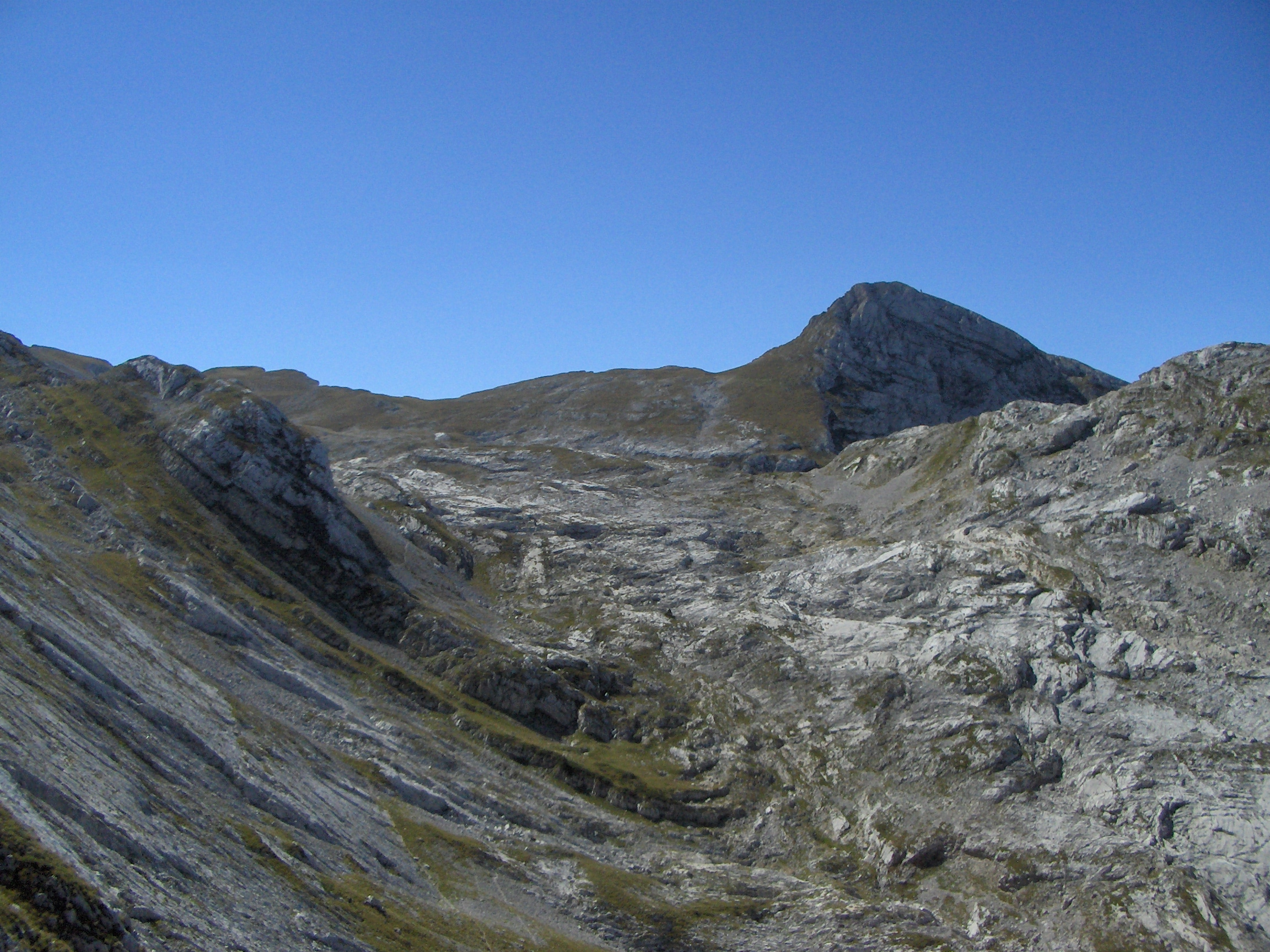 Situées à l'est du vallon, les dalles très inclinées donnent une idée du pendage des strates de calcaire. Au sud la Grande Moucherolle domine le vallon et le domaine skiable de Villard de Lans .